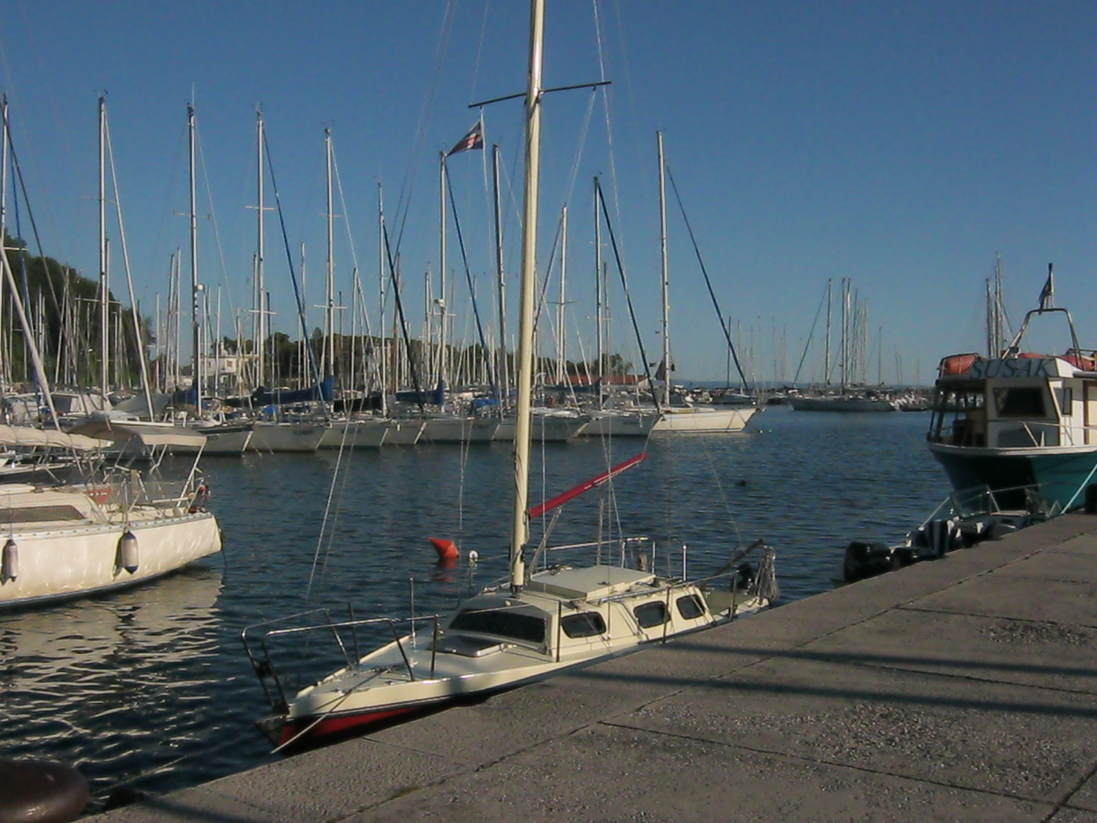 Der Hafen von Sistiana